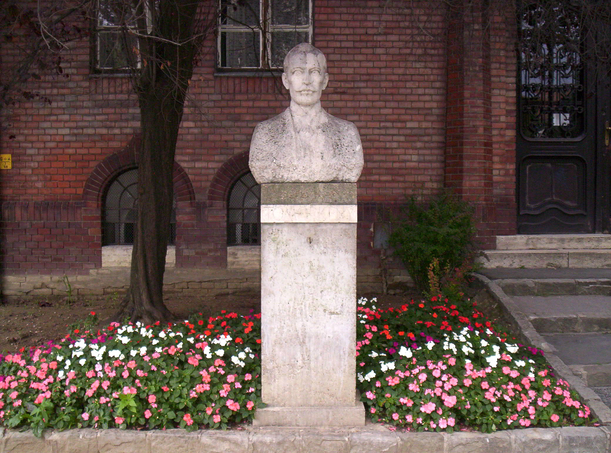 Tömörkény István szobra Szegeden. Kalmár Márton alkotása